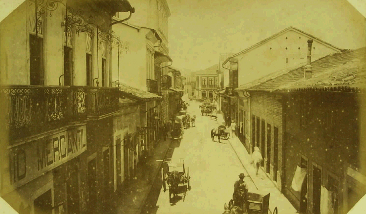 Rua do Commercio, São Paulo, Brasil